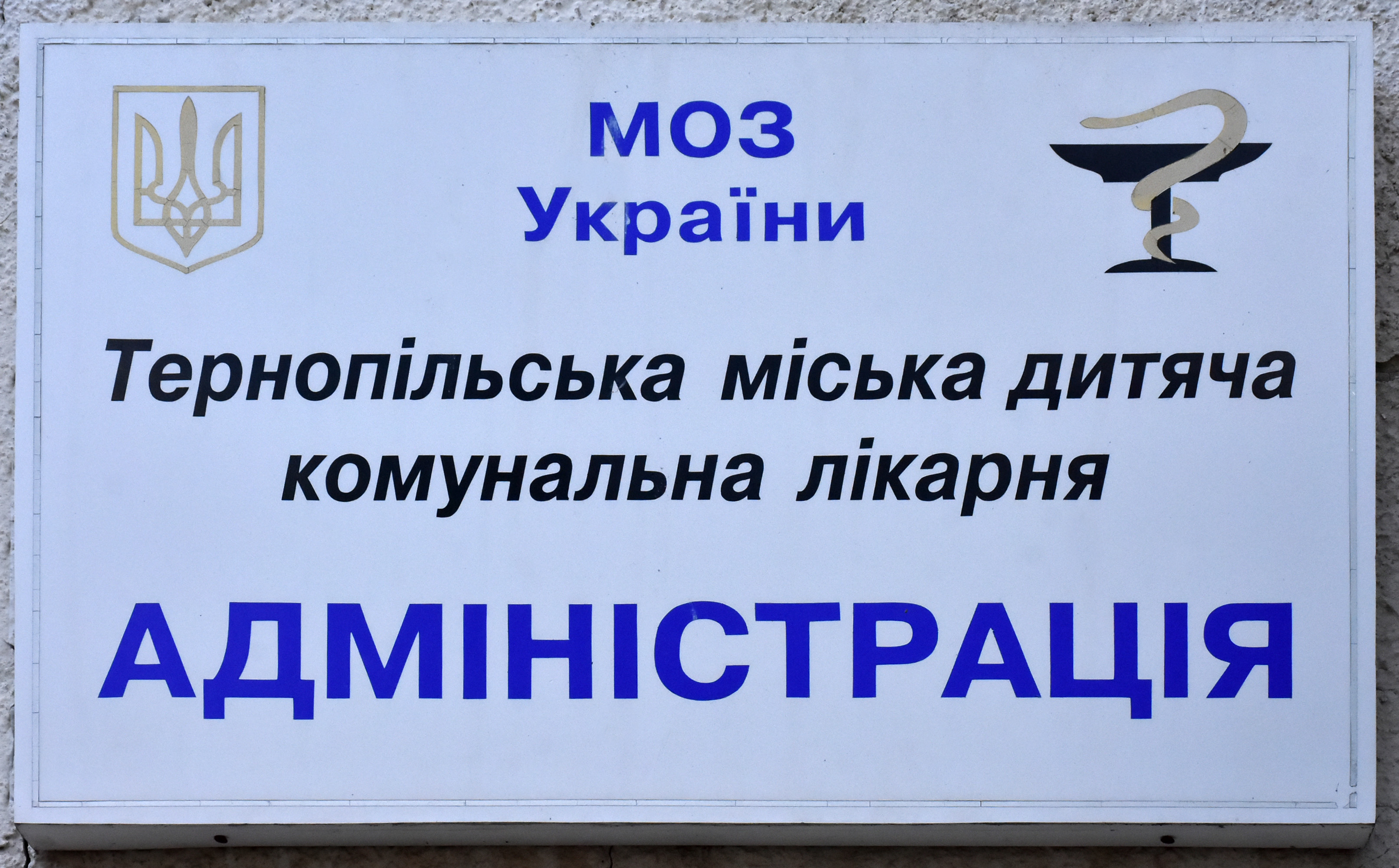 Вивіска: «Тернопільська міська дитяча комунальна лікарня. Адміністрація».